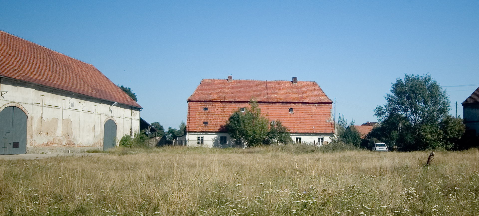 Oficyna dworska Olbrachtowice, ul. Wronia 20, Sobótka